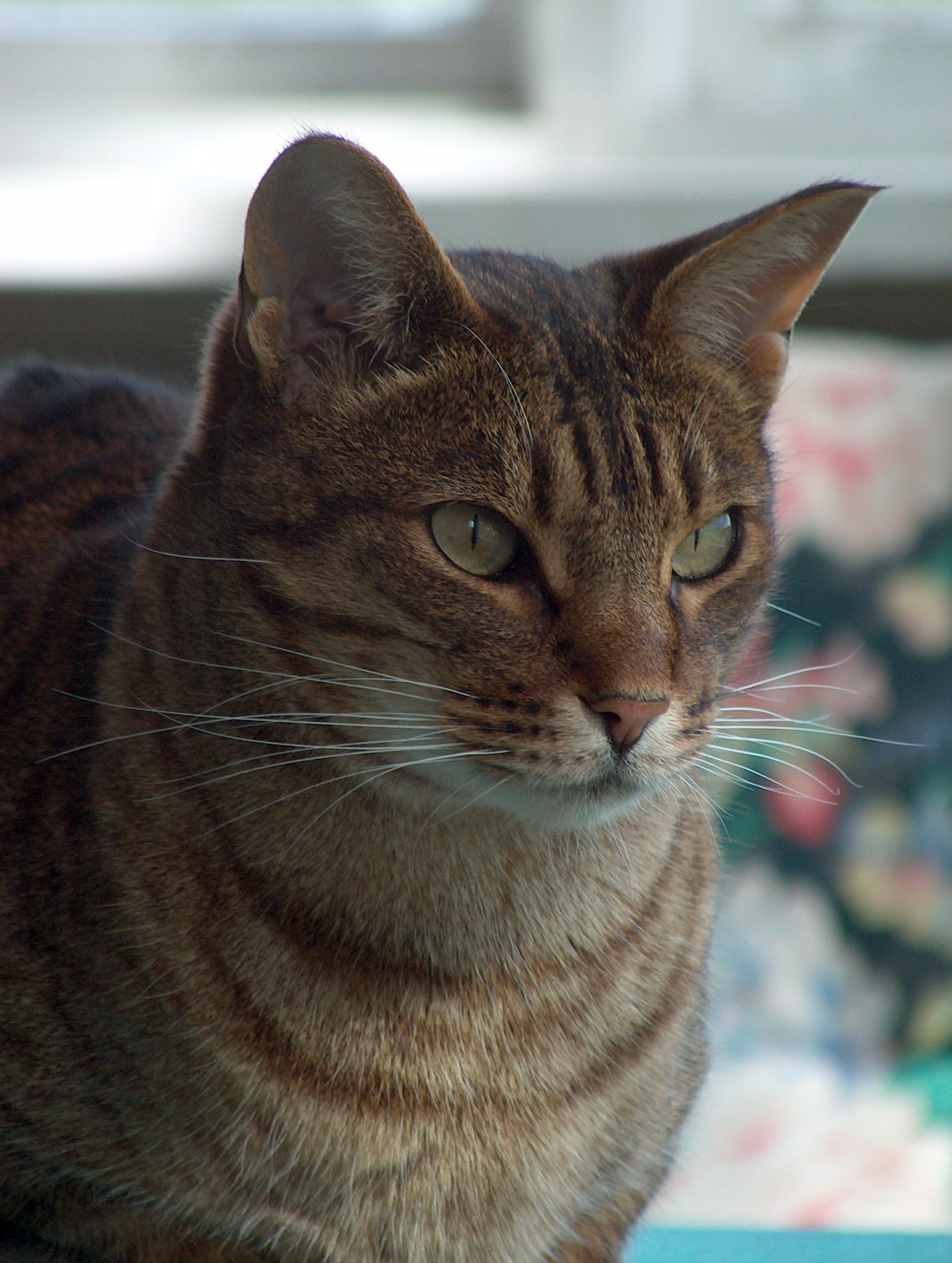 Ocicat (male)